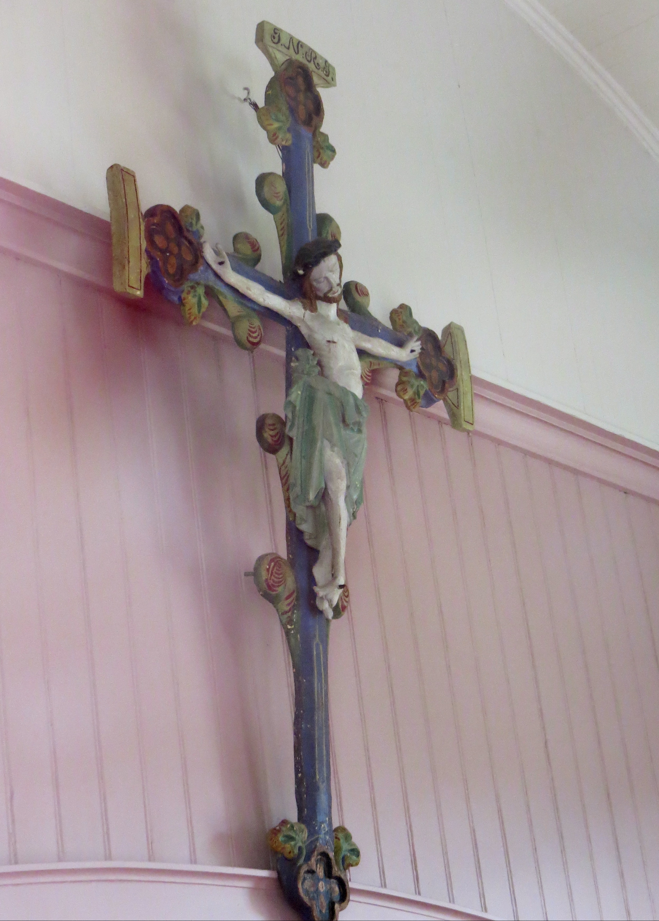 Krucifiks fra Helgen Kirke, Nome i Telemark